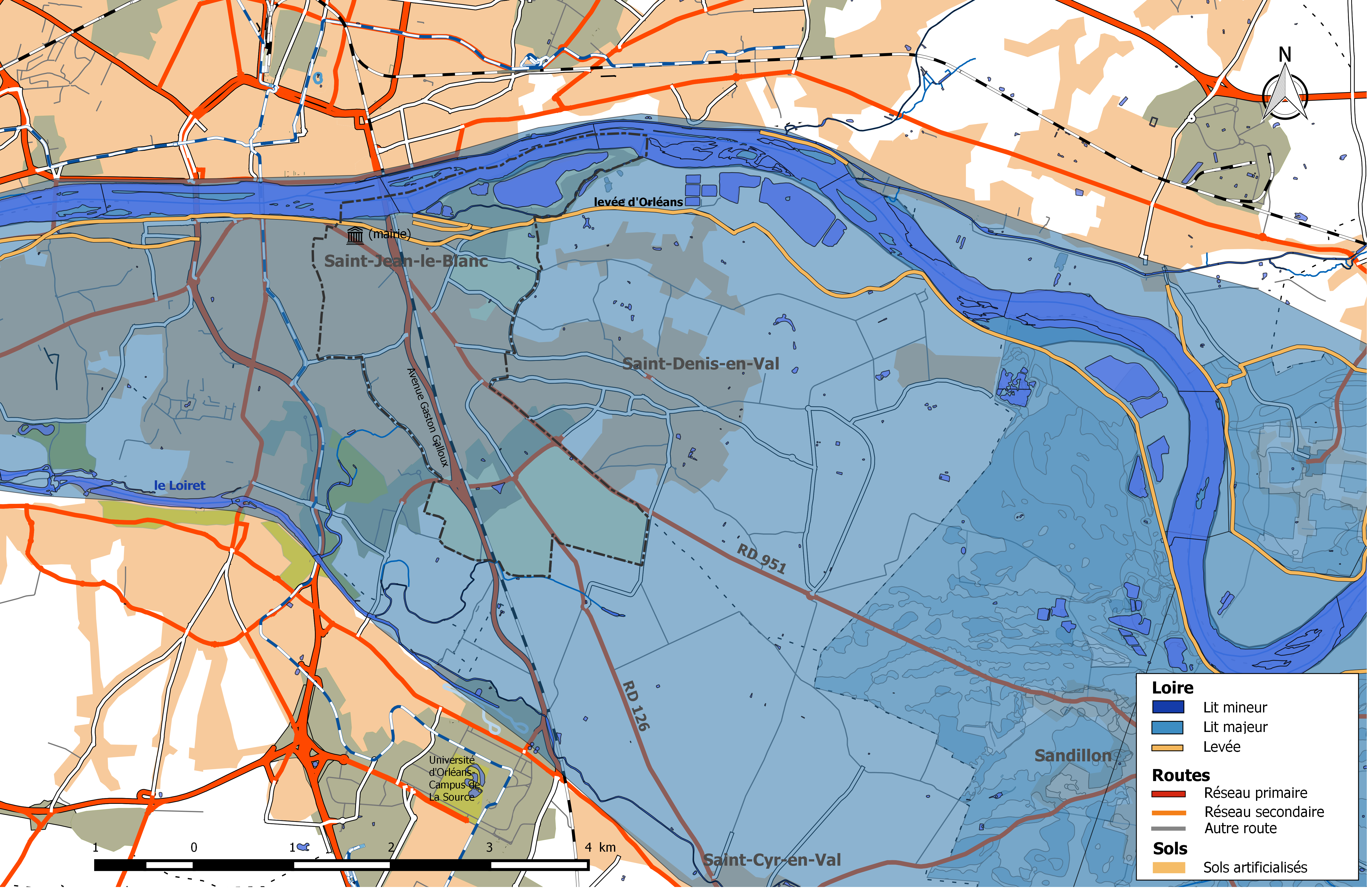 Zone inondable et réseaux hydrographique et routier de la commune de Saint-Jean-le-Blanc.